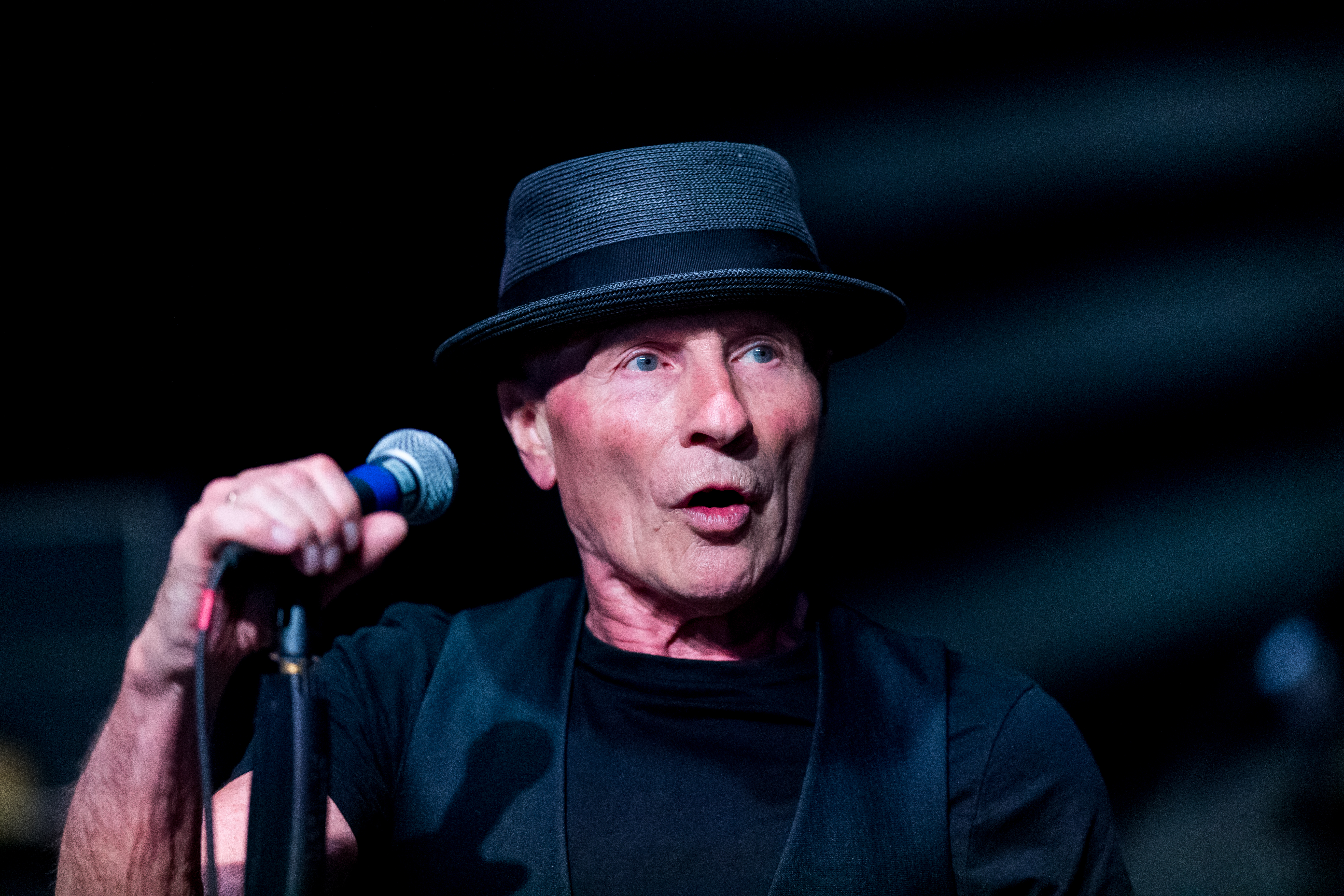 UFO during Wacken Open Air at The Holy Wacken Land, Wacken, Schleswig-Holstein, Germany on 2019-07-31, Photo: Sven Mandel